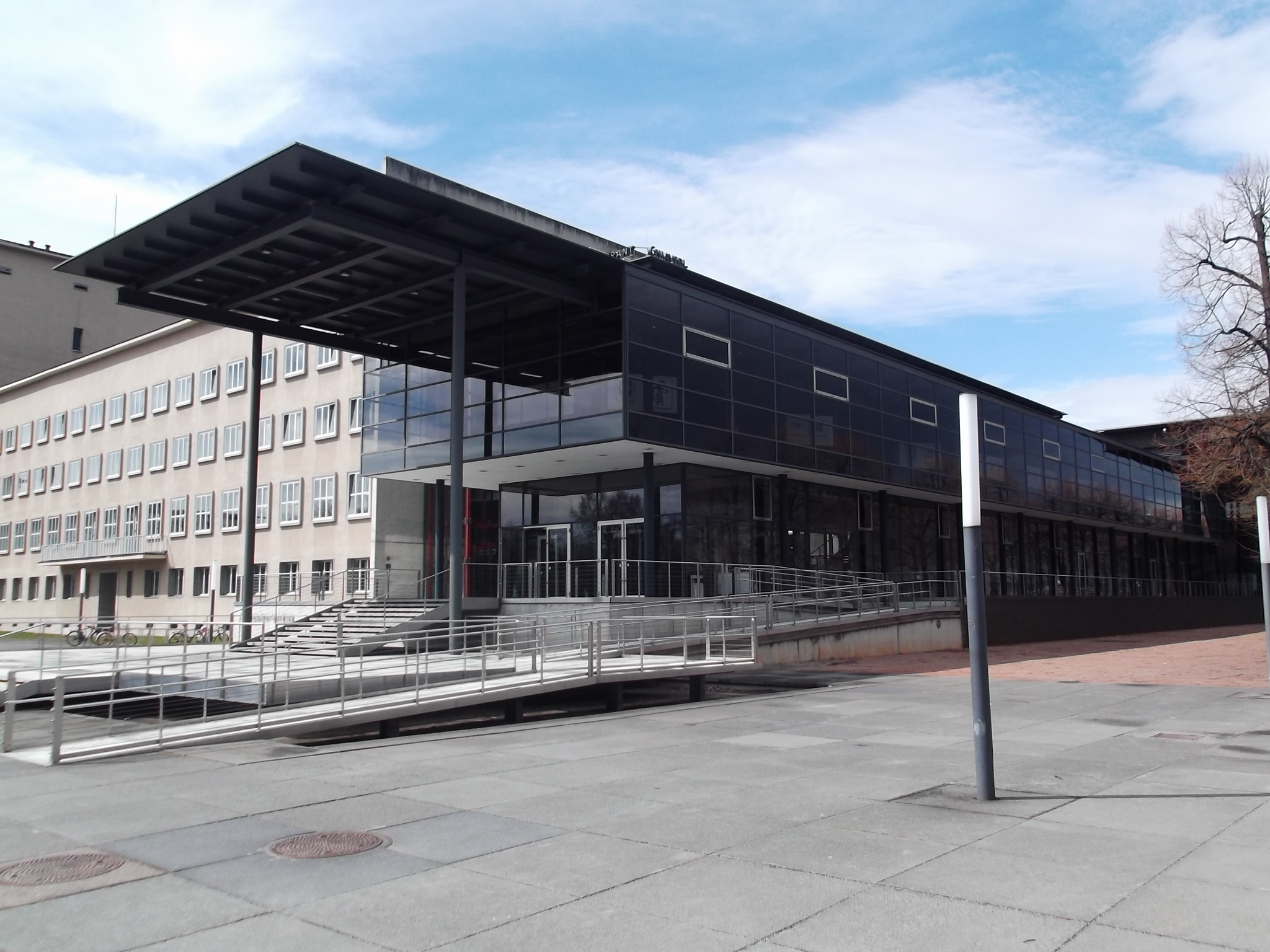 Sächsischer Landtag (Dresden) von außen